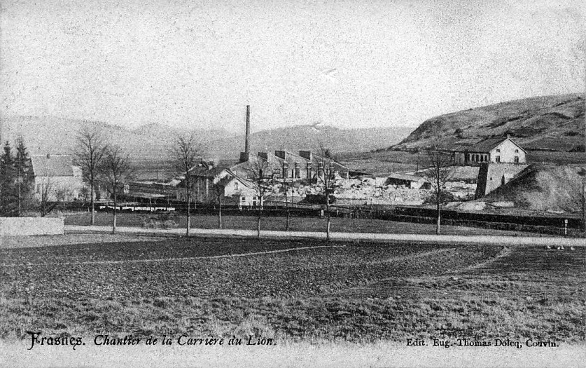 Au centre de l'image, l'ancienne gare devant la cheminée du chantier de la carrière du Lion vers 1900.